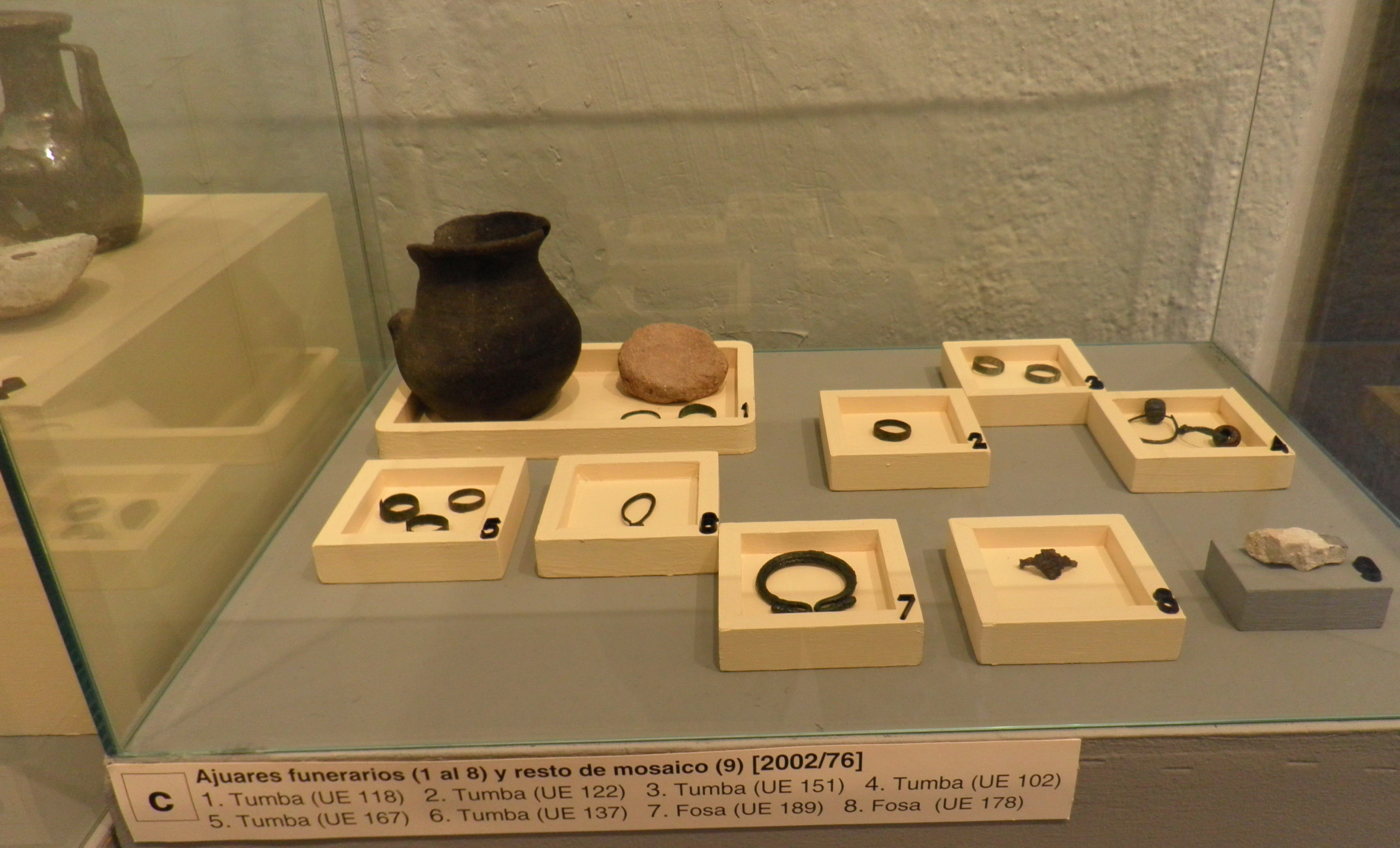 Ajuares funerarios procedentes de las excavaciones en las necrópolis visigoda y altomedieval